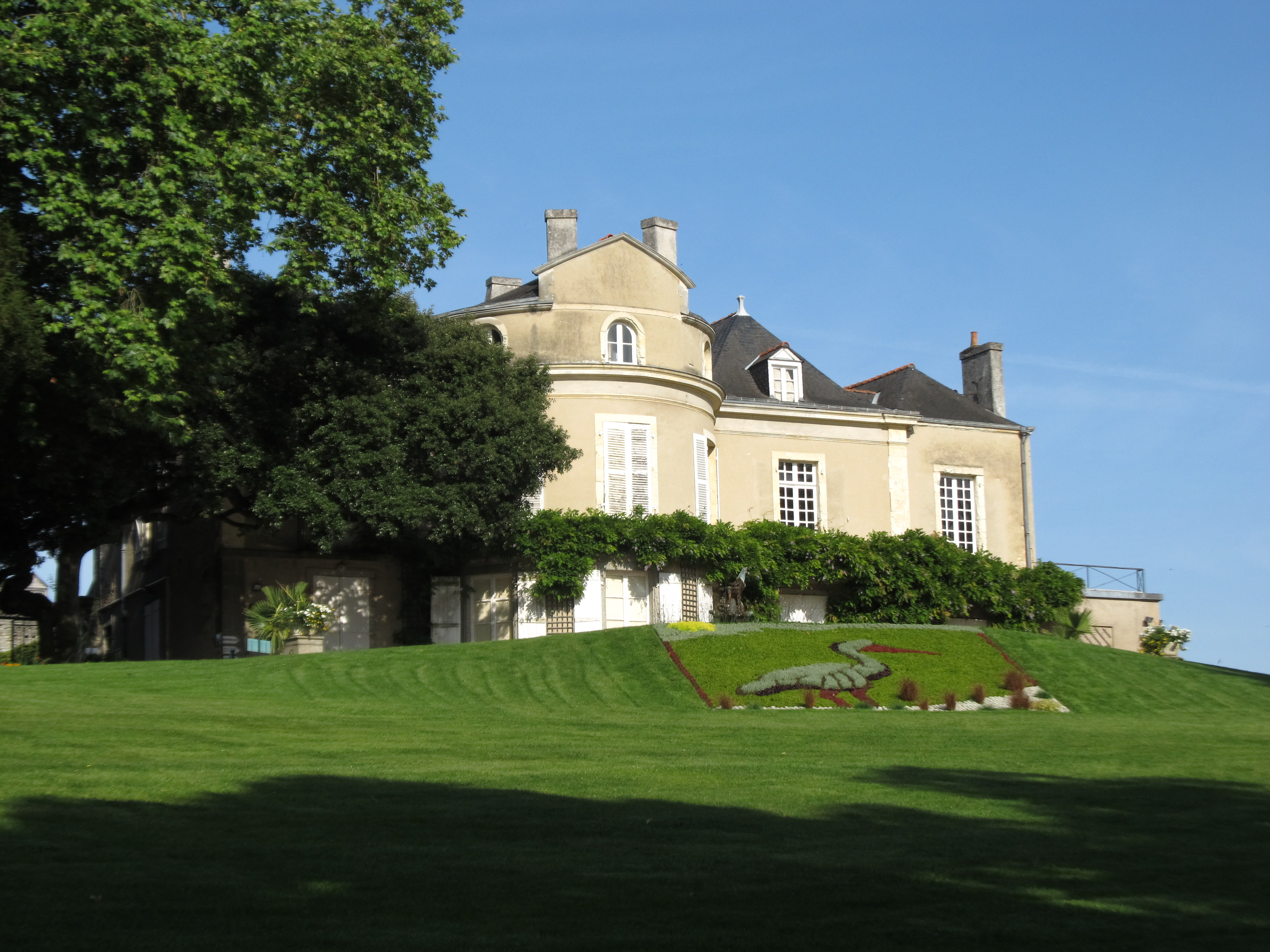 Jardin de la Perrine, Laval, Mayenne, France